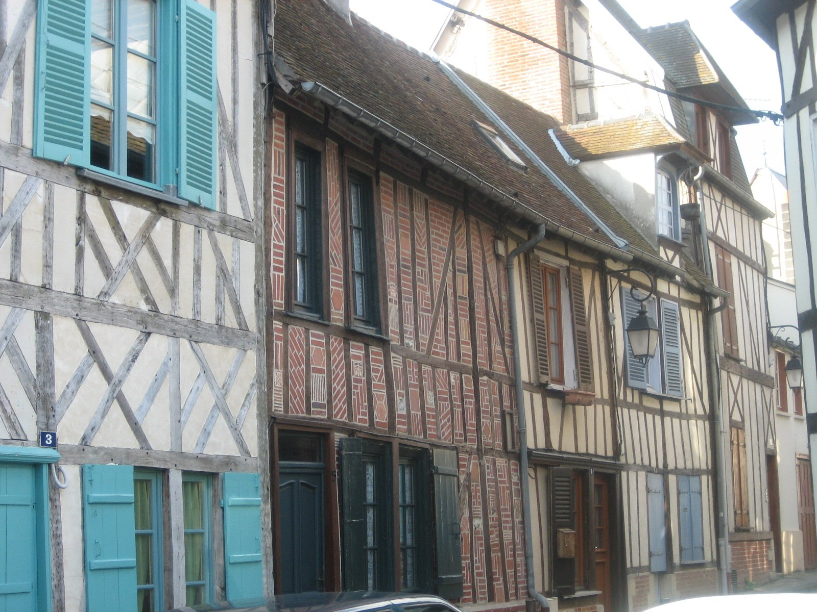 E puer vun de wéinege mëttelalterlechen Haiser zu Beauvais, déi erhale bloufen. 30. Abrëll 2006